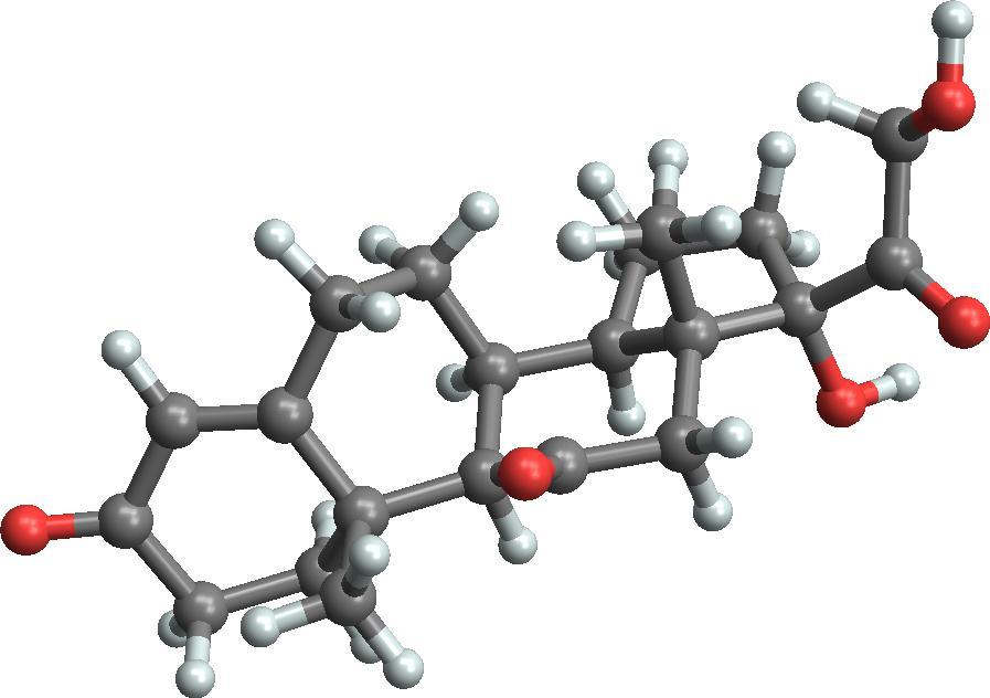 Трехмерная модель молекулы кортизона